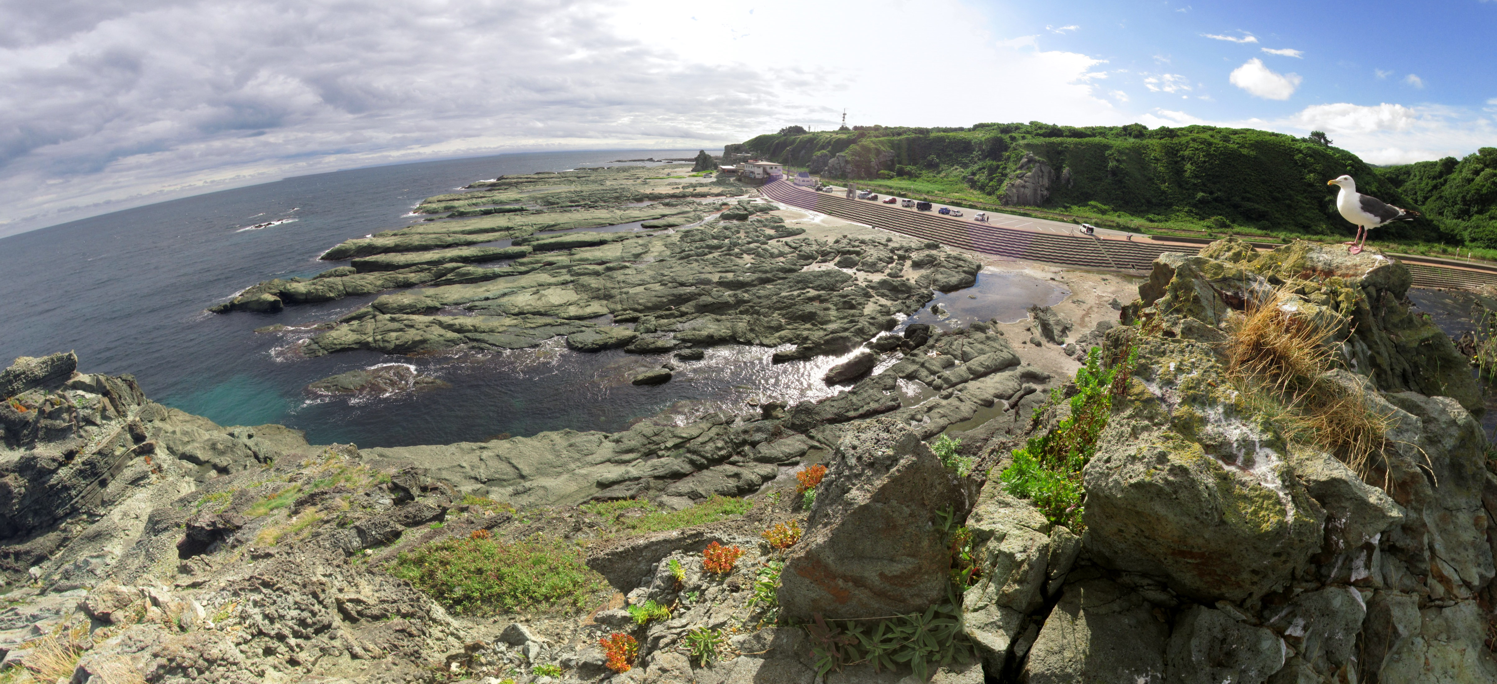 日本国,青森県,西津軽郡,深浦町,千畳敷,景勝地,Canon PowerShot SX170IS,３０枚パノラマ合成写真,Microsoft ICE Ver.2,使用,日本の夕陽百選,海水浴場,撮影者：あおもりくま,Aomorikuma,Kumax_aomori